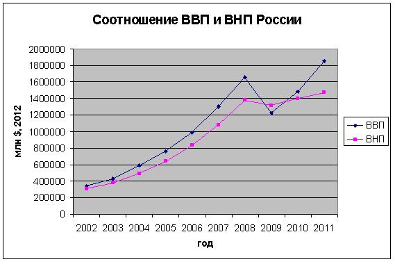 Соотношение ВВП и ВНП России по данным всемирного банка